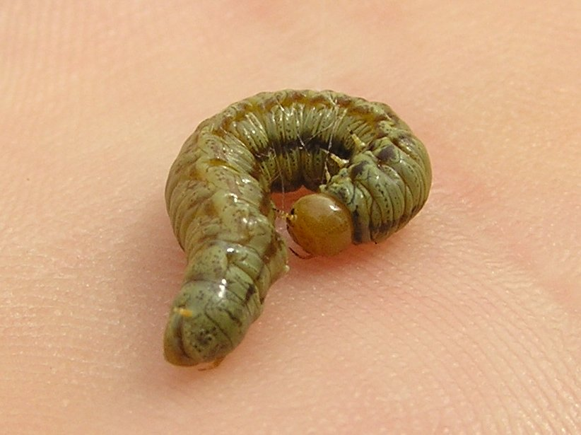 Acantholyda hieroglyphica, Osnuja sadzonkowa - larwa.